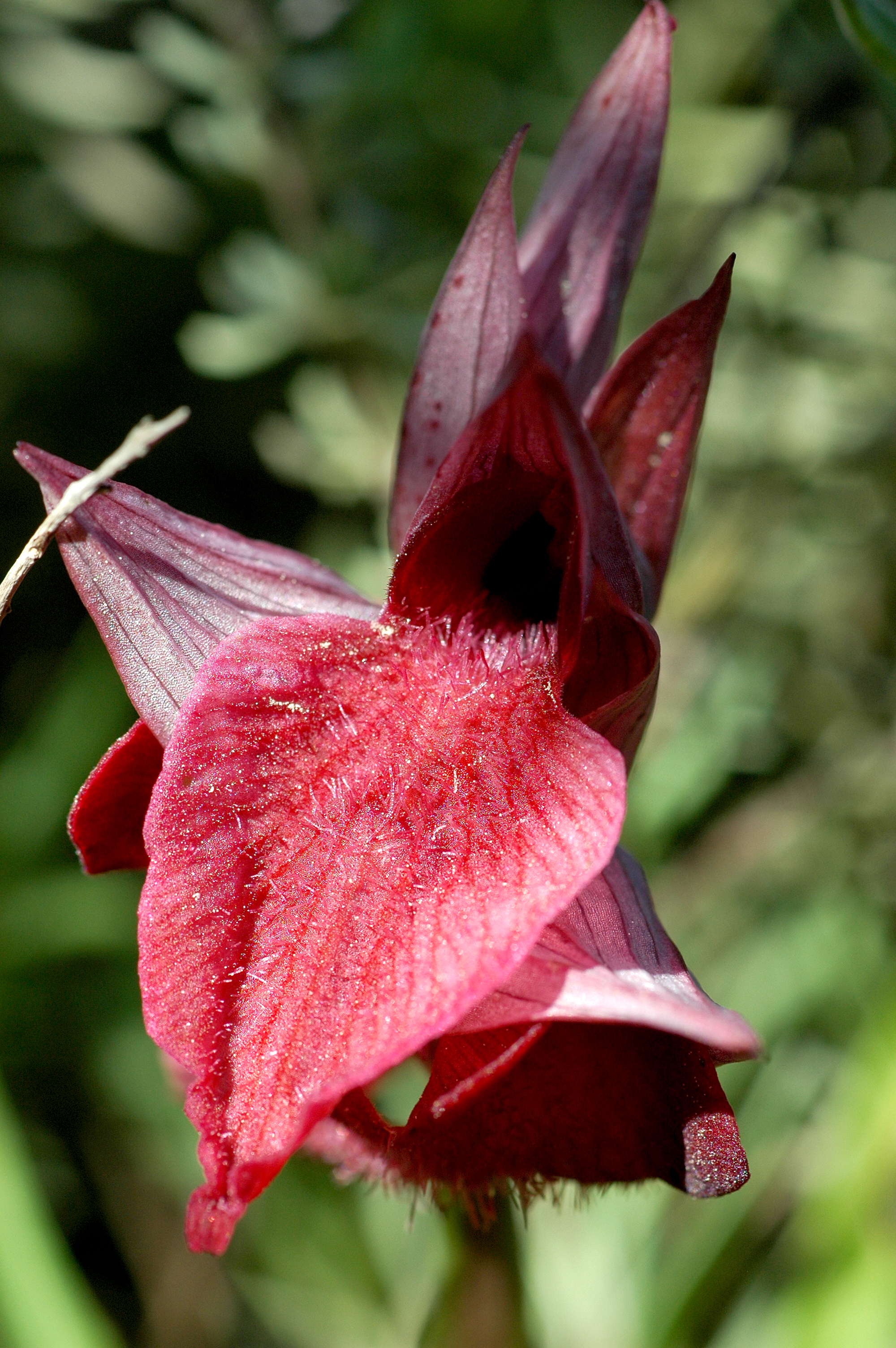 Serapias cossyrensis - Pantelleria, Montagna Grande